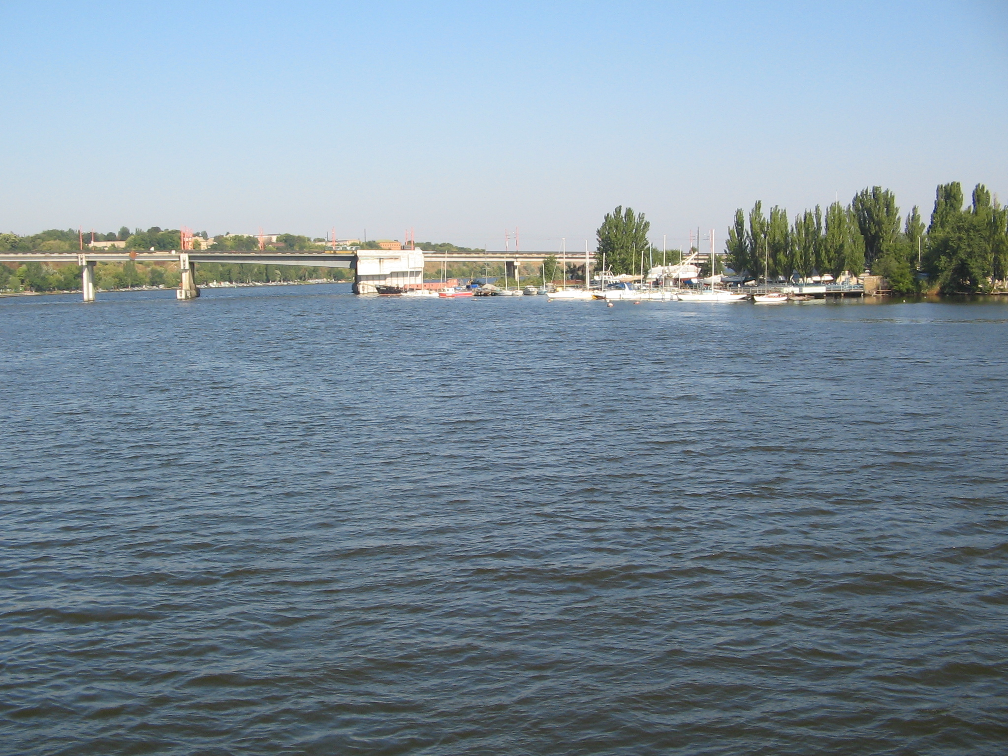 Ингул в Николаеве